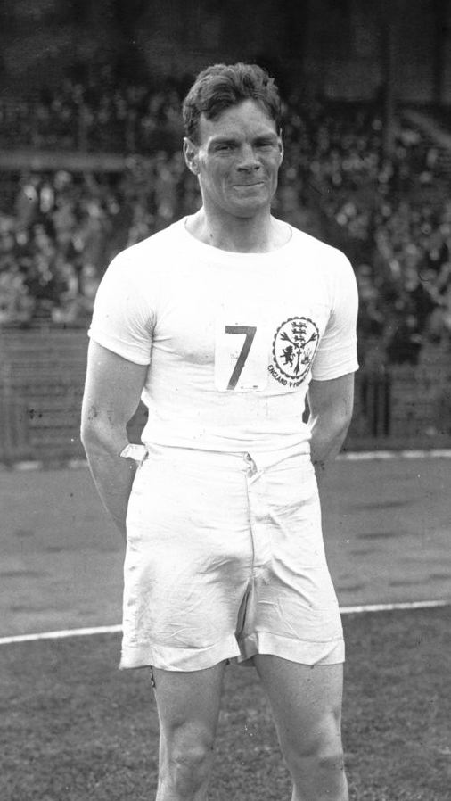 Colombes : match d'athlétisme France Angleterre : Butler (anglais) gagnant du 200 m. (portrait) : [photographie de presse] / Agence Meurisse